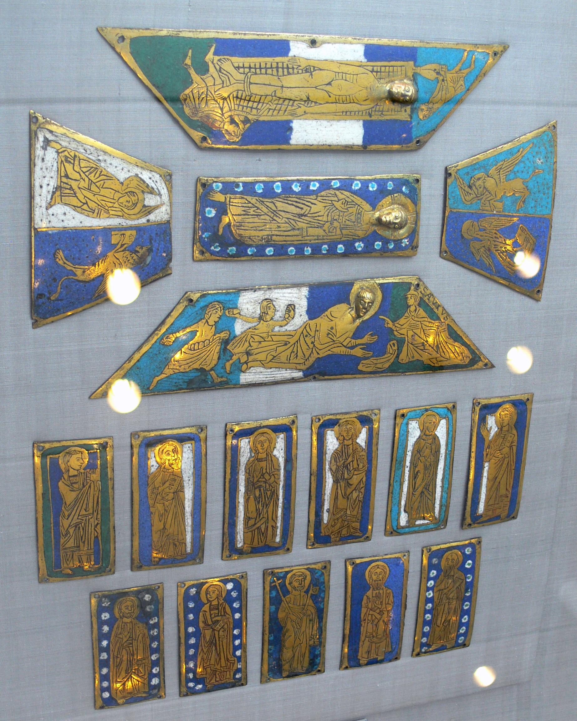 Grubenschmelzplatten von einem Reliquiar; Norddeutschland (?), Ende 12. Jh., Kunstgewerbemuseum Berlin, Inv. K 4184